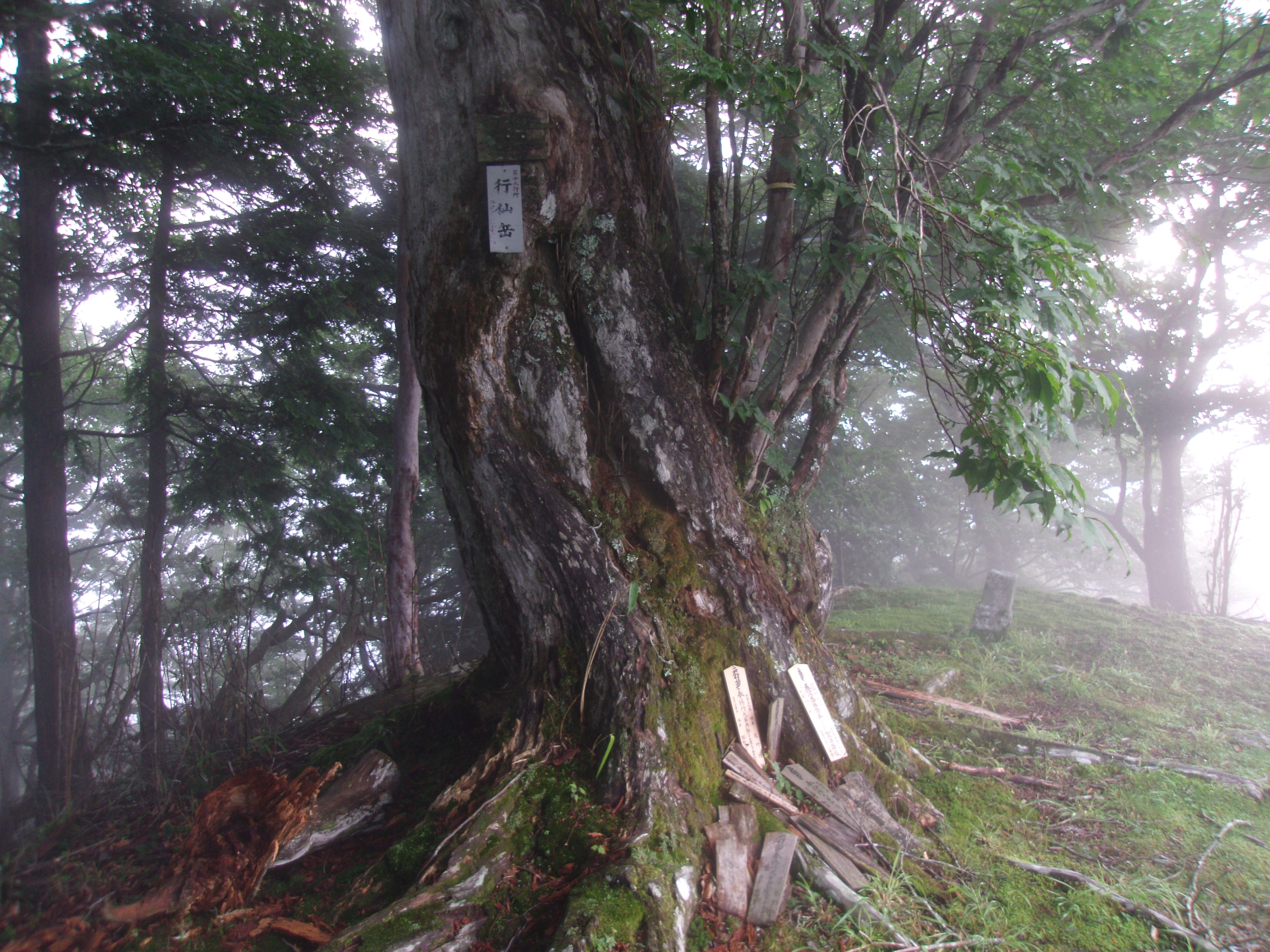 大峯奥駈道第19靡「行仙岳」